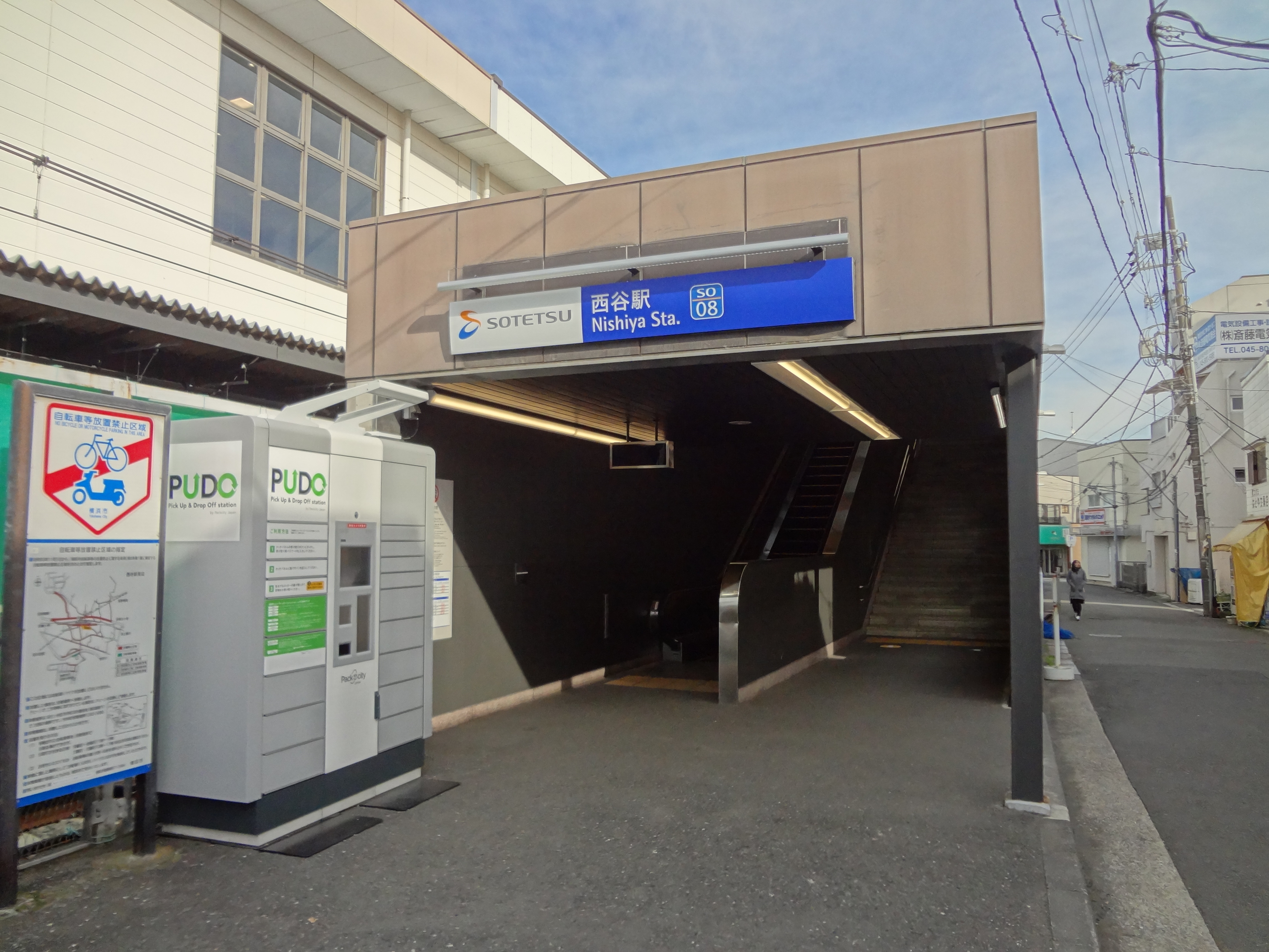 西谷駅南口（2019年12月1日）